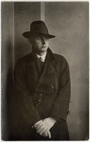 Photo de l'écrivain letton Anšlavs Eglītis (1906-1993) faite dans les années 1920. Debout, de face ( 13,8x8,8 cm). Autour inconnu.